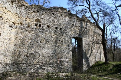 Domburg im Hakel